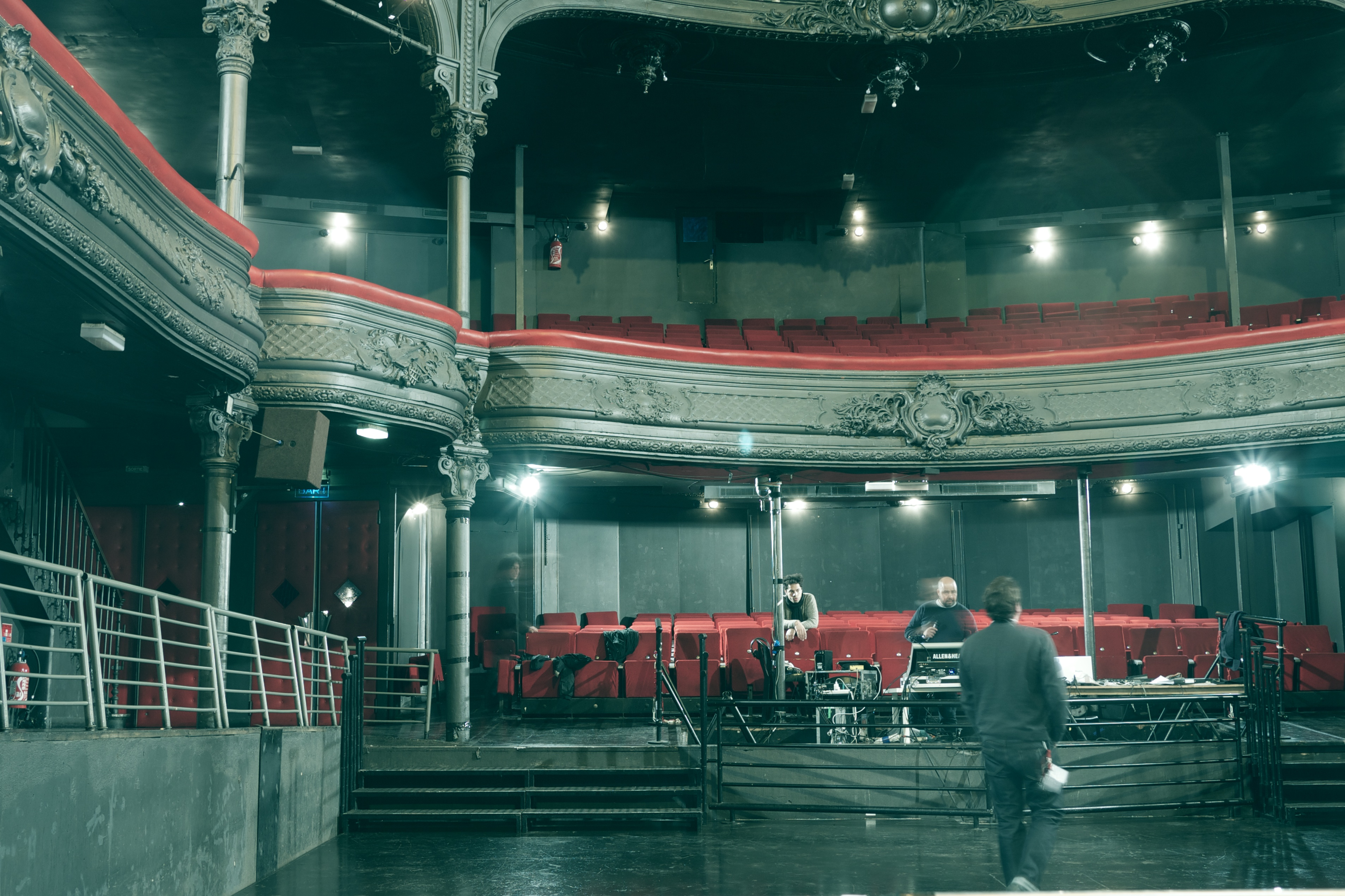 La Cigale